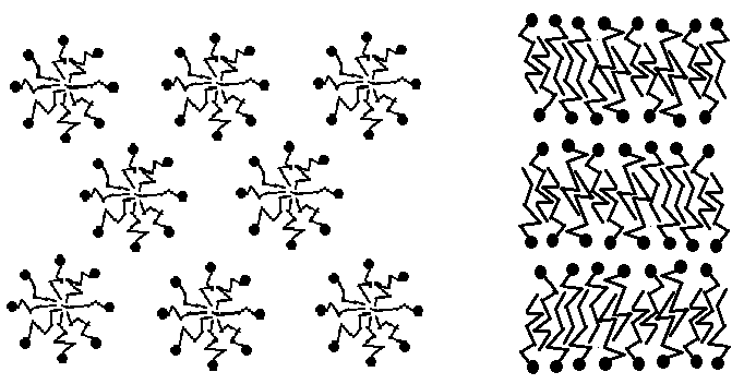 הפאזה הלימנרית והפאזה ההקסגונלית של גביש נוזלי ליוטרופי